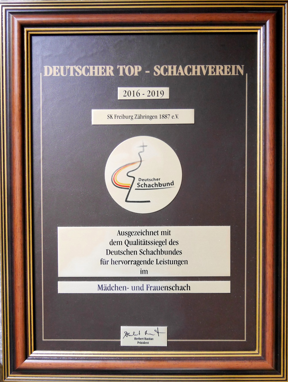 Auszeichnung des Deutschen Schachbundes: DEUTSCHER TOP - SCHACHVEREIN 2016 - 2019 (eingerahmte Urkunde).